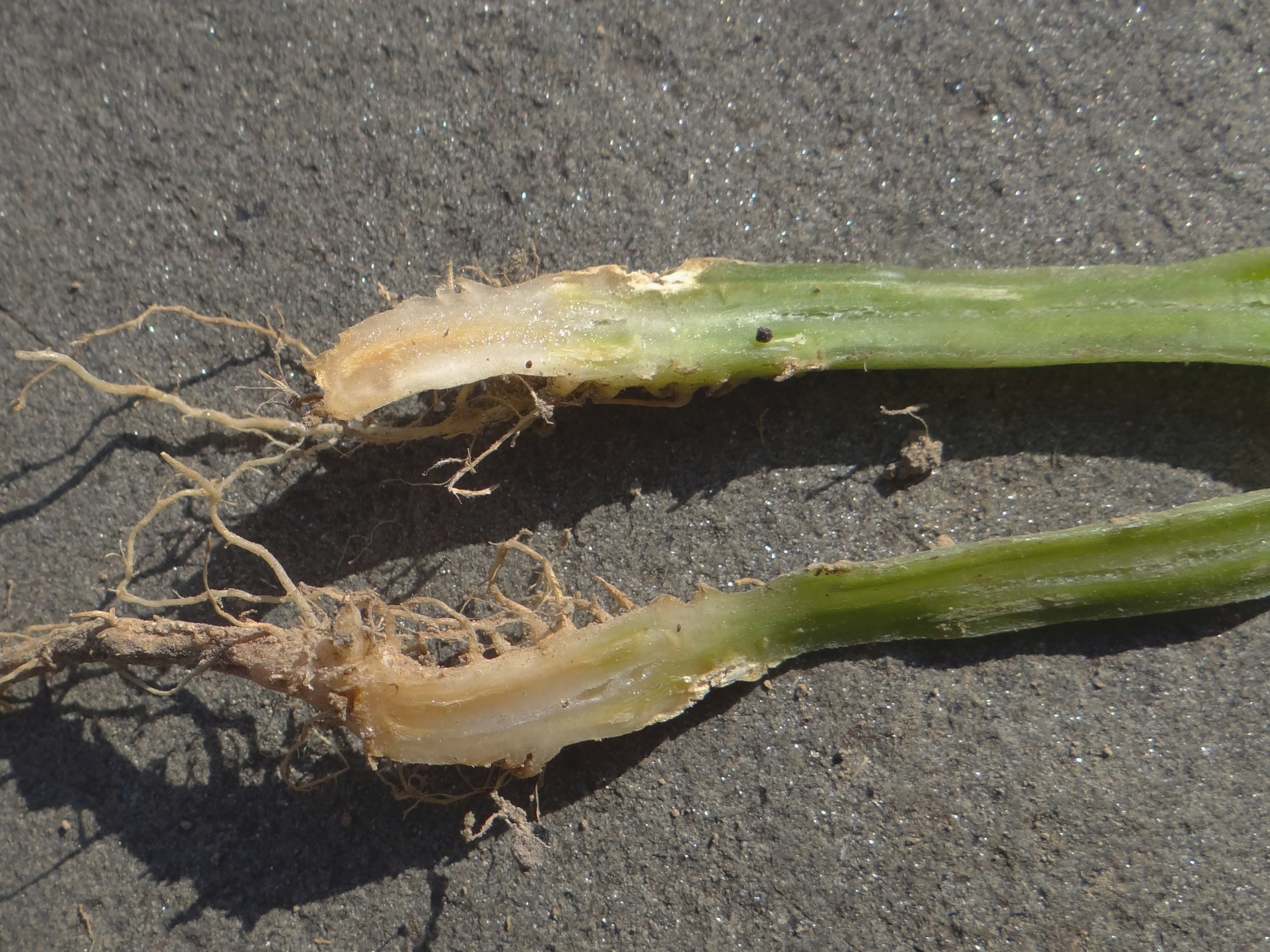 Fusariosis on Cucumis sativa